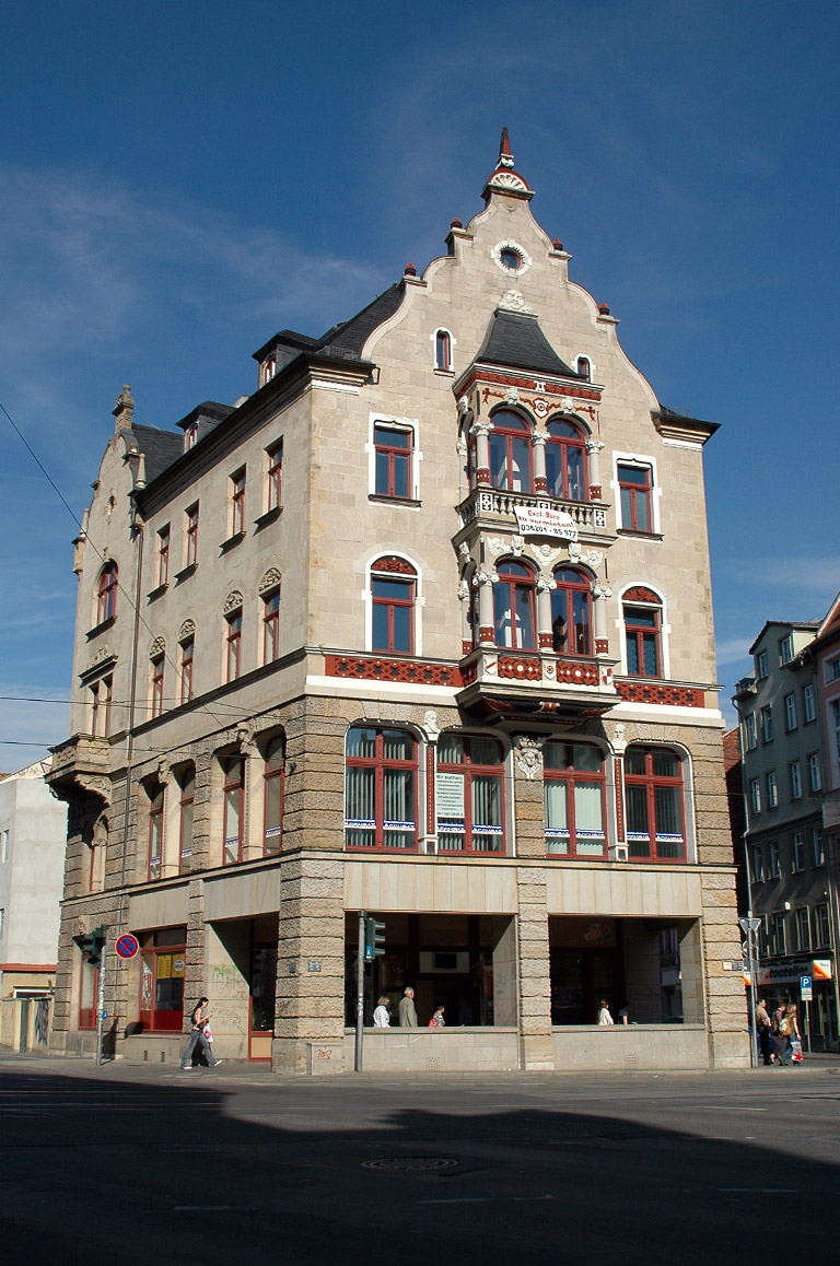 Burenhaus (errichtet 1902) an der Ecke Juri-Gagarin-Ring/Bahnhofstraße in Erfurt